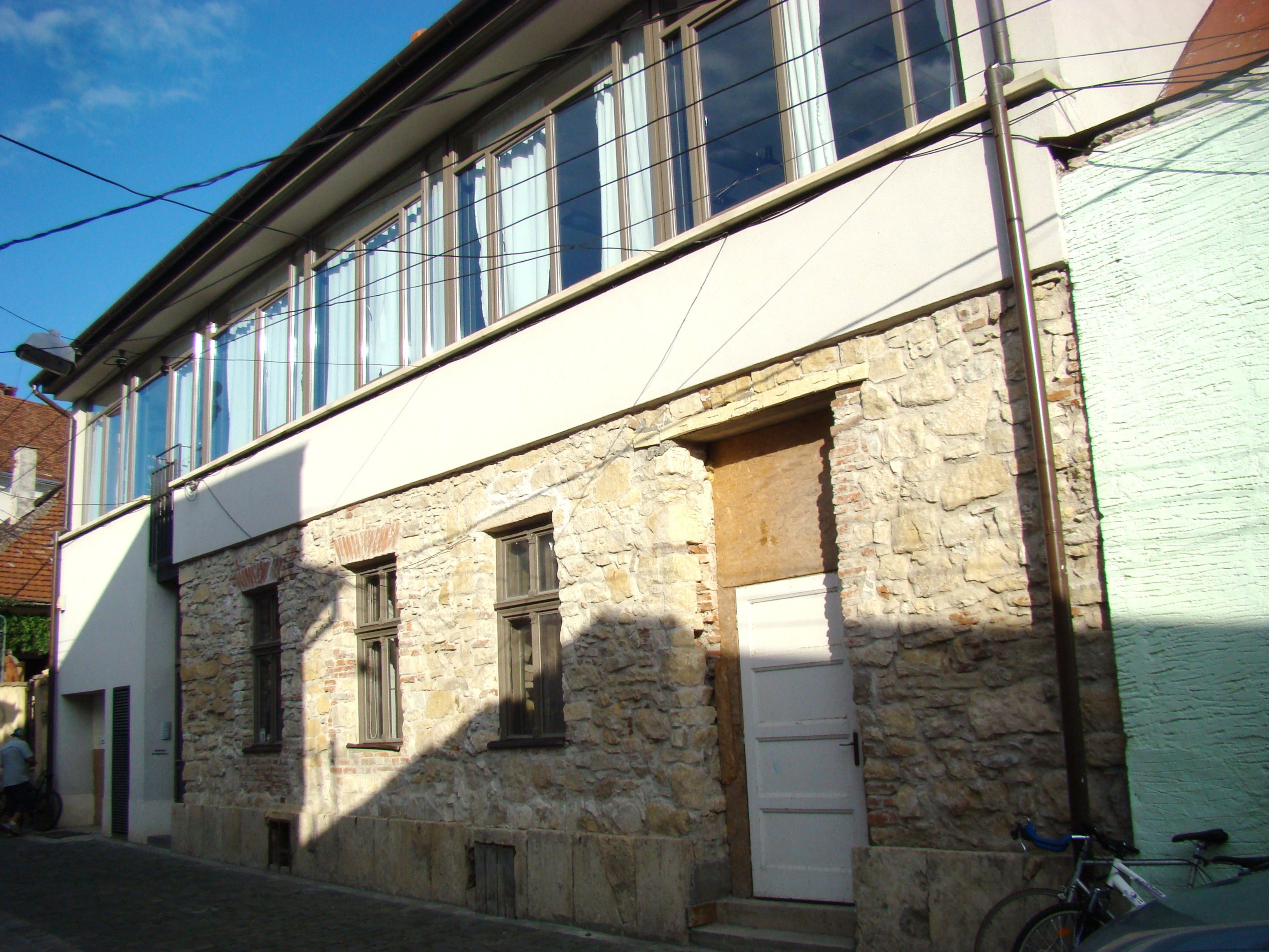 Clădire monument istoric, str.Clemenceau Georges 3